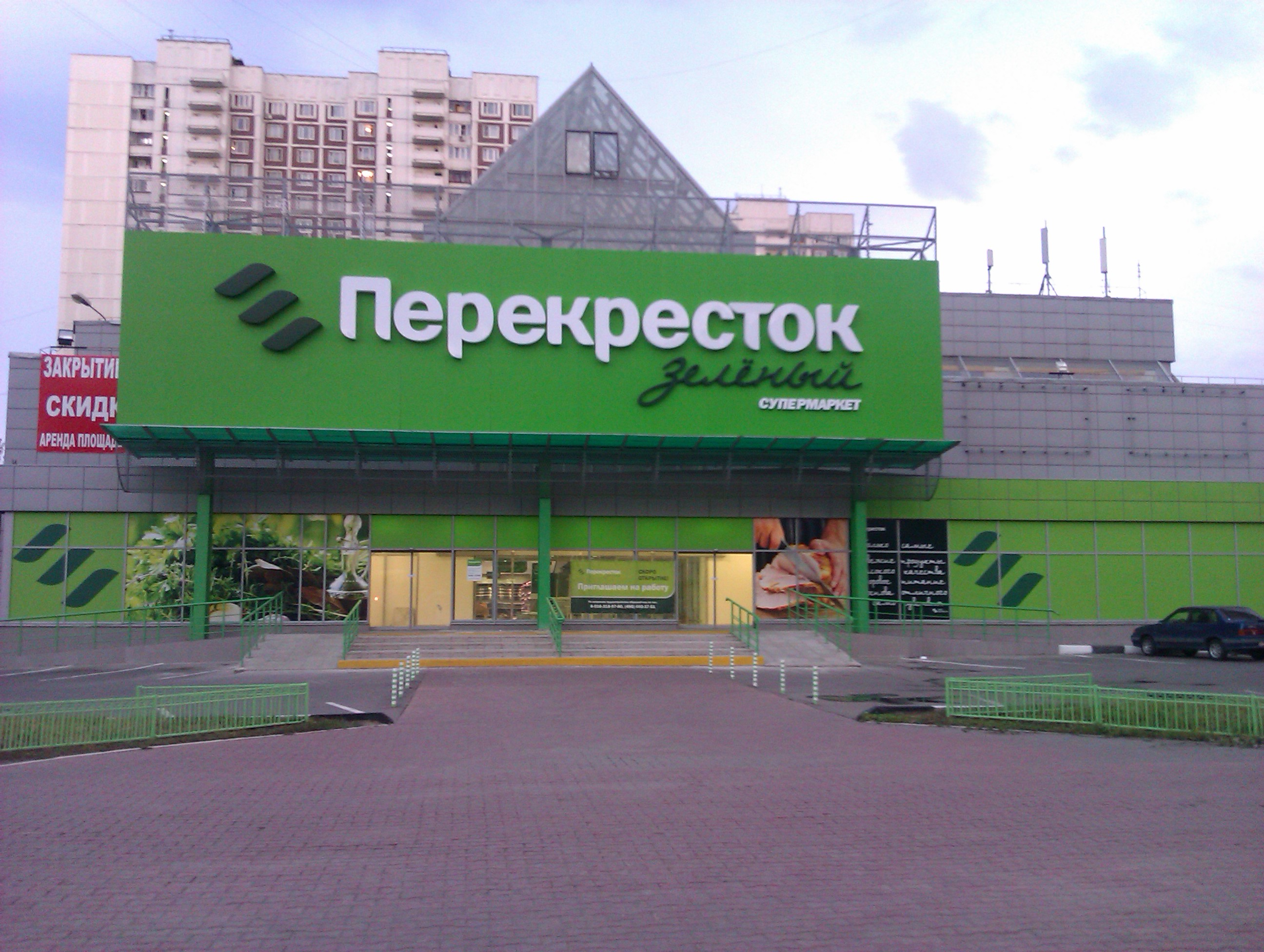 "Перекрёсток" в Южном Бутово, бывшая "Копейка"